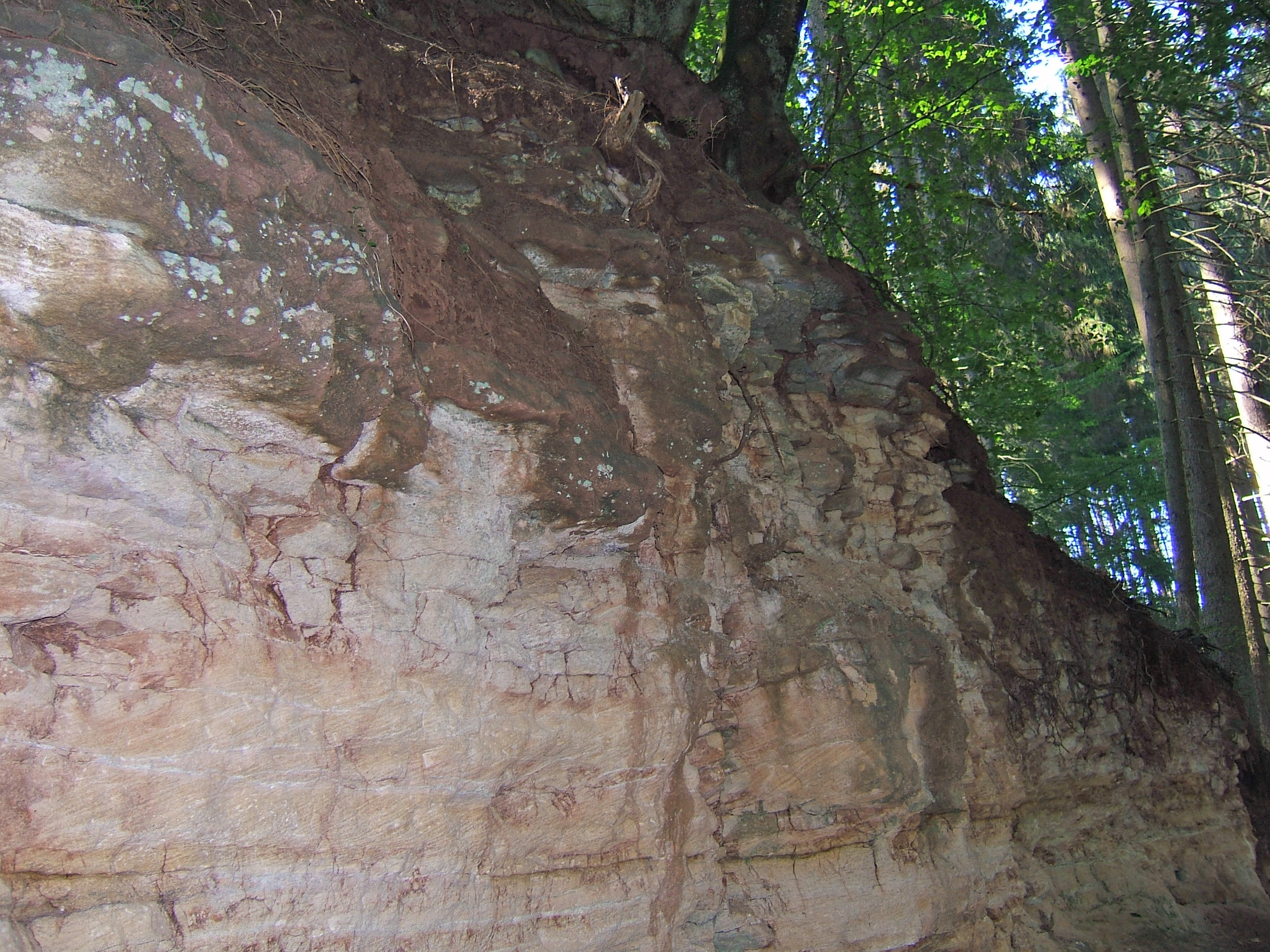 Stubensandsteinaufschluss im Kirnbachtal im Schönbuch